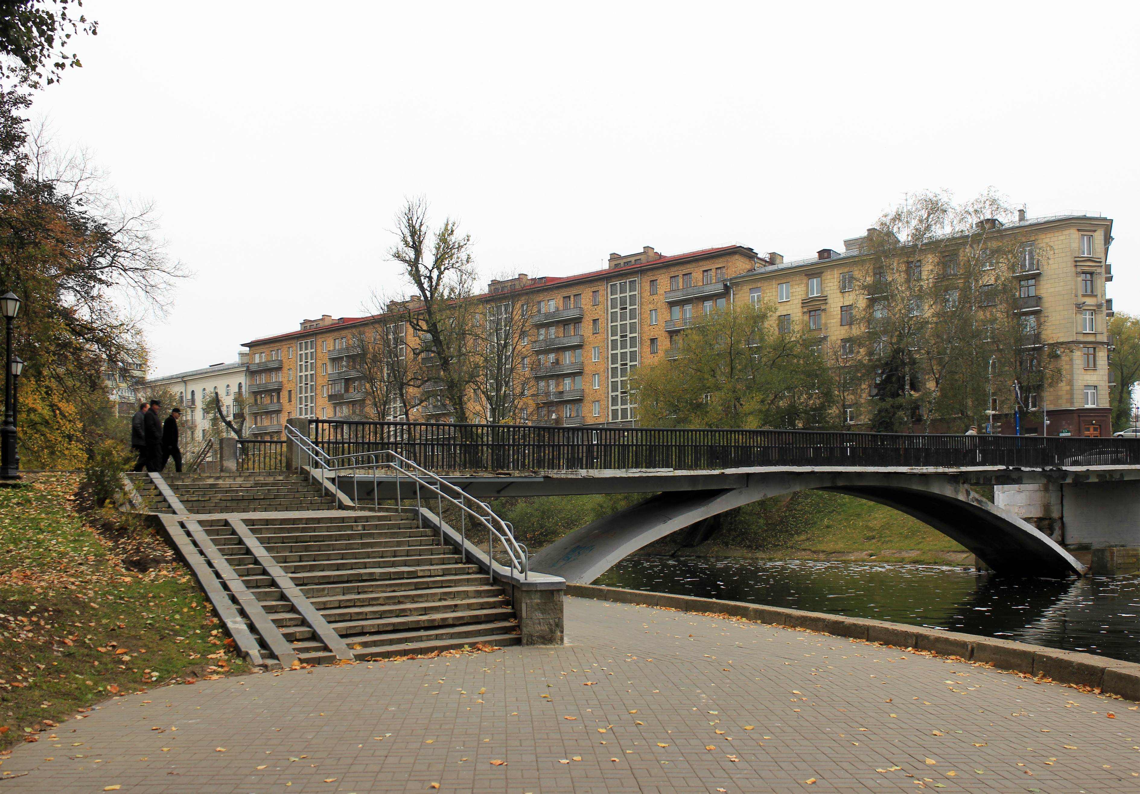 Минск. Пешеходный мост через реку Свислочь в парке Горького.